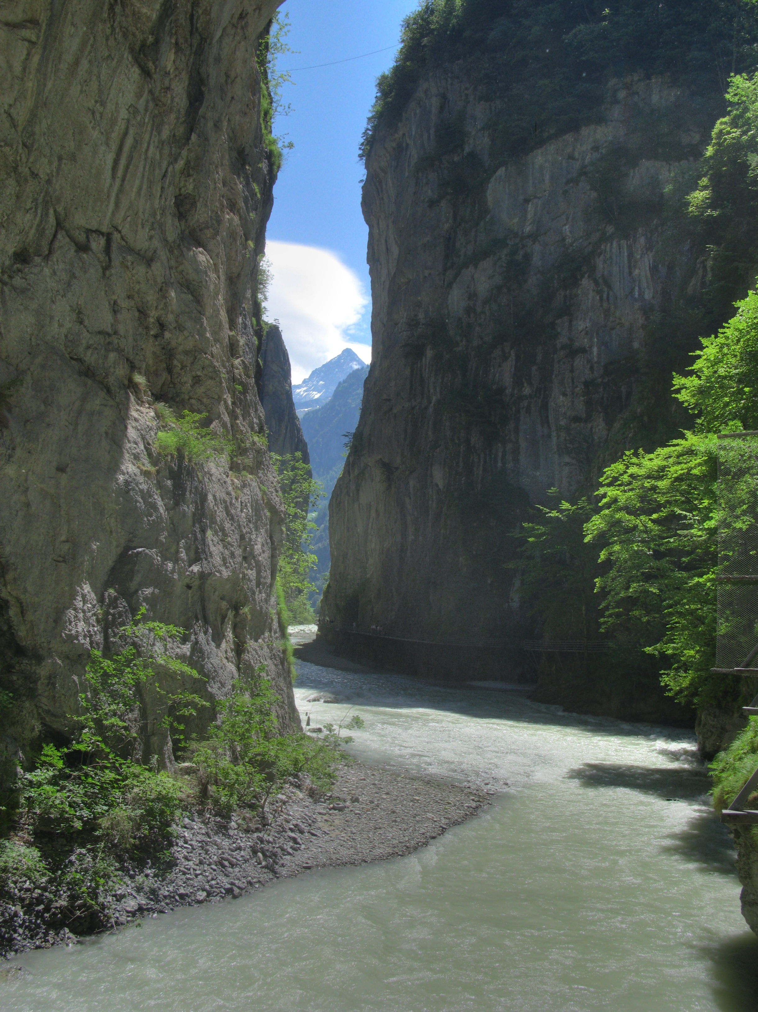 Aareschlucht (Aar gorge) near Meiringen